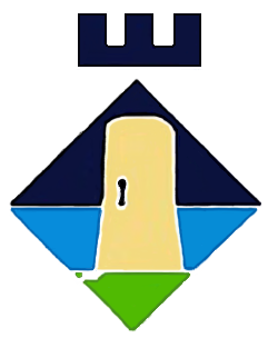 escudo de la localidad de Portocristo en la isla de Mallorca